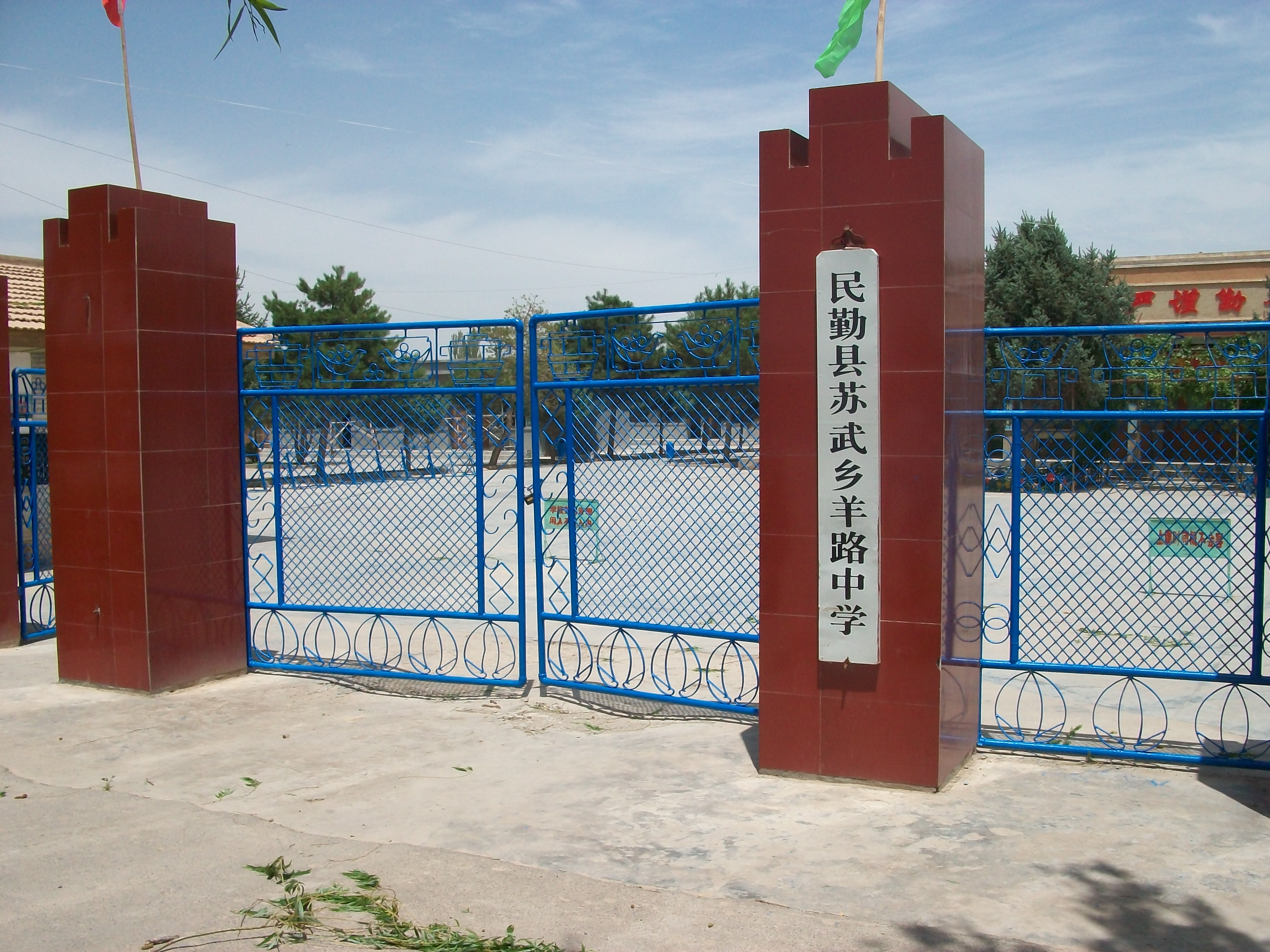 羊路中學學校大門